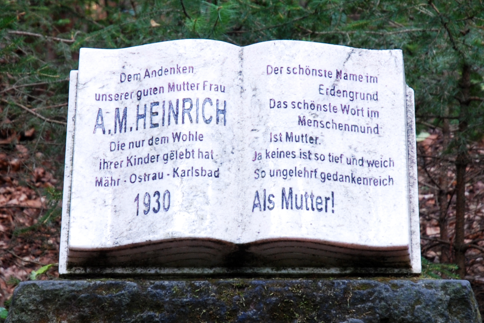 Památník Kniha v karlovarských lázeňských lesích